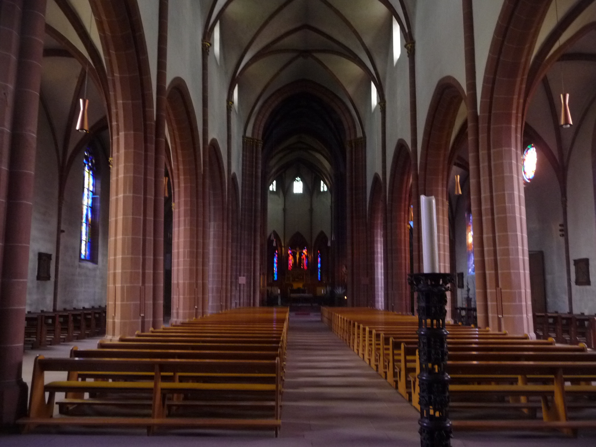 Die Liebfrauenkirche in Worms gilt als bedeutendstes erhaltenes sakrales rein gotisches Bauwerk zwischen Straßburg und Köln.